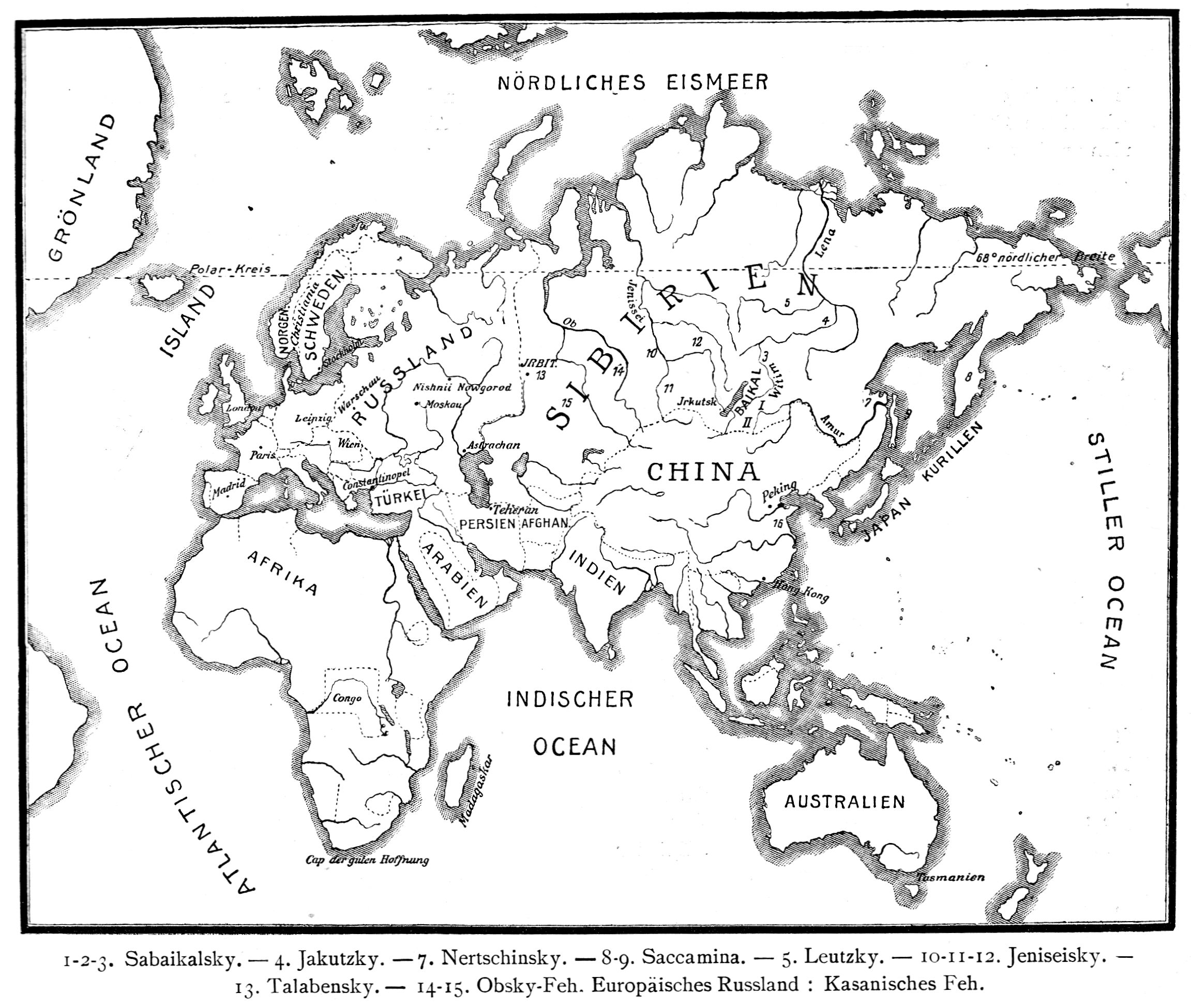 Herkunftskarte der Fehfelle (Felle russischer Eichhörnchen).